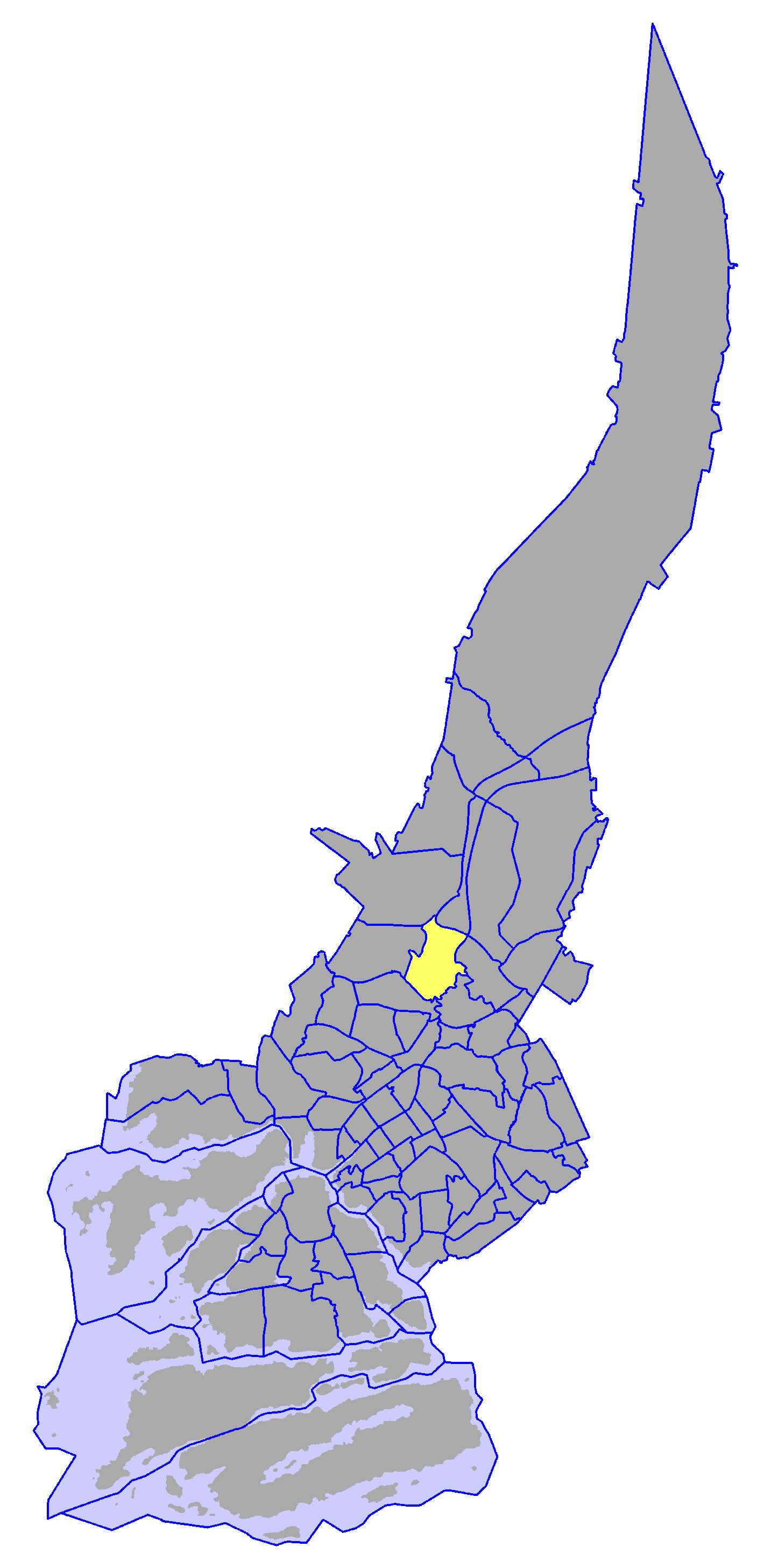 District of Kärsämäki, in Turku